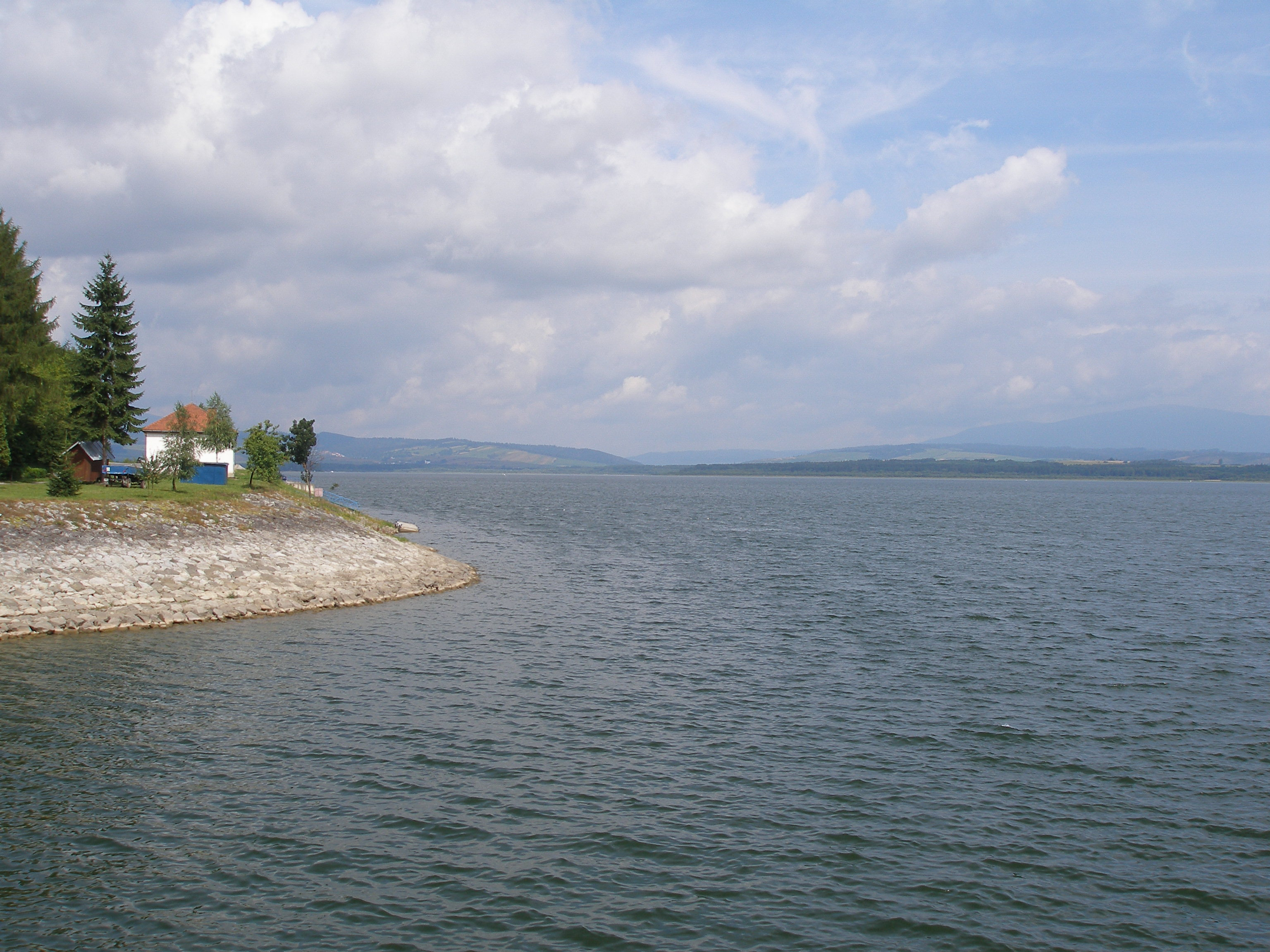 Vodné dielo Oravská priehrada, región Orava okr.Tvrdošín